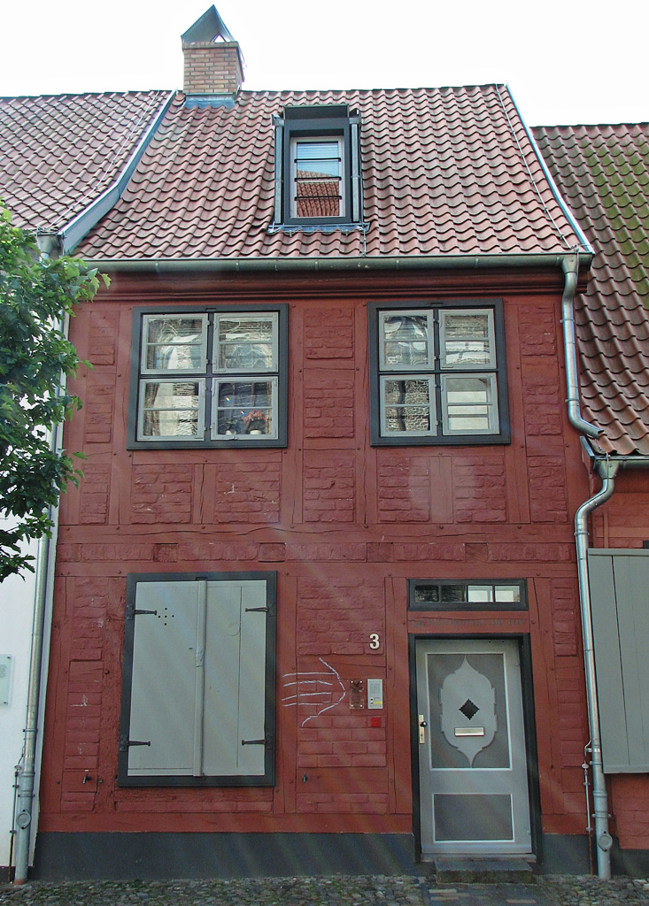 Beschreibung: Kempowski-Archiv (Klosterhof vom Heiligen Kreuz) in Rostock / Germany Fotograf: Darkone, 17. August 2005